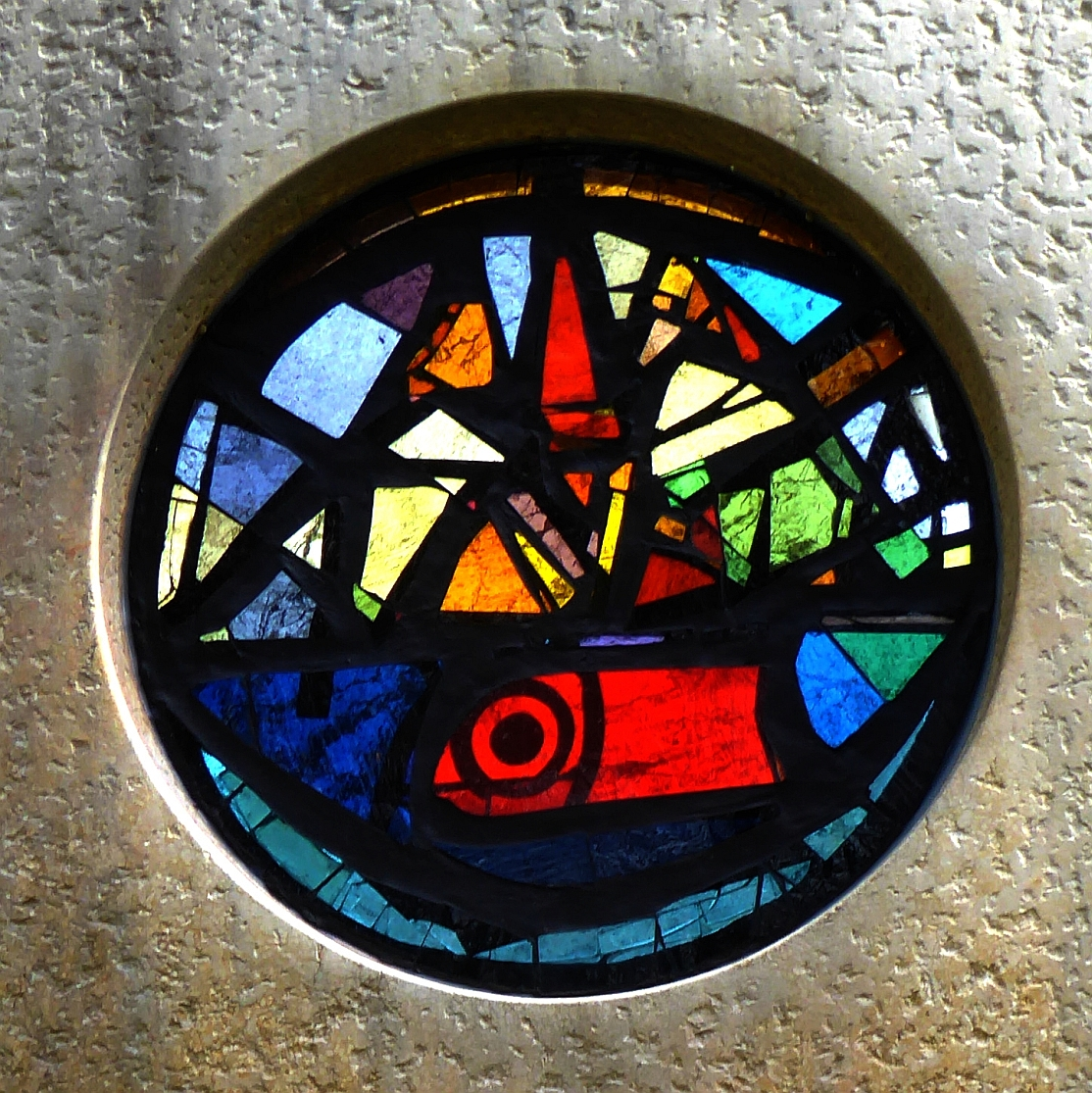 Pieter van de Cuylen-Köhli (1909–1990) Kunstmaler, Zeichner, Plastiker, Religiöse Kunst, Glasbild-Grab auf dem Friedhof Hörnli, Riehen, Basel-Stadt